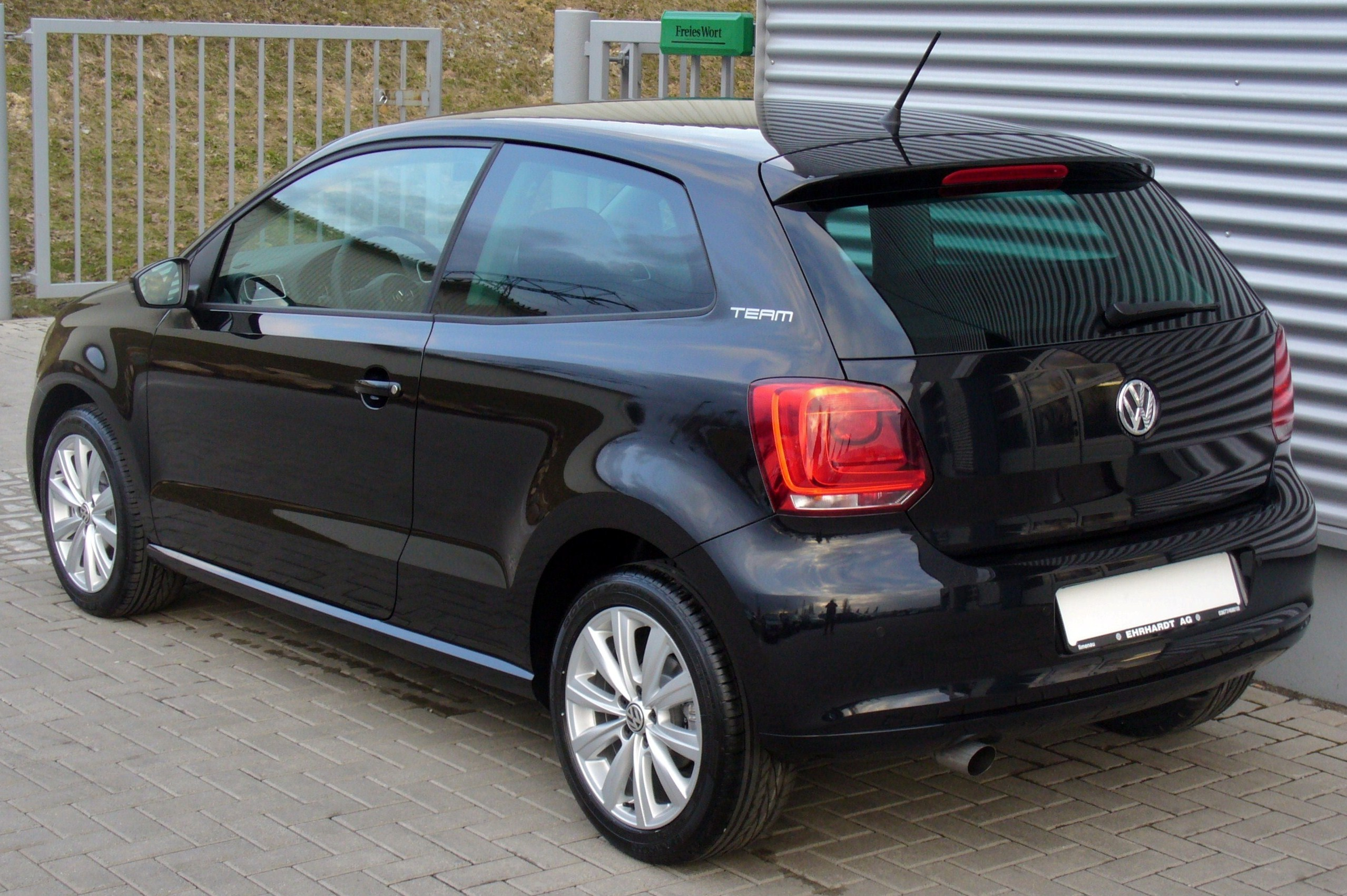 VW Polo V